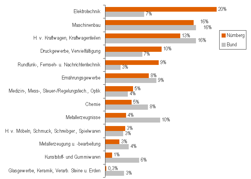 Industriestruktur in Nürnberg im Vergleich zum Bund